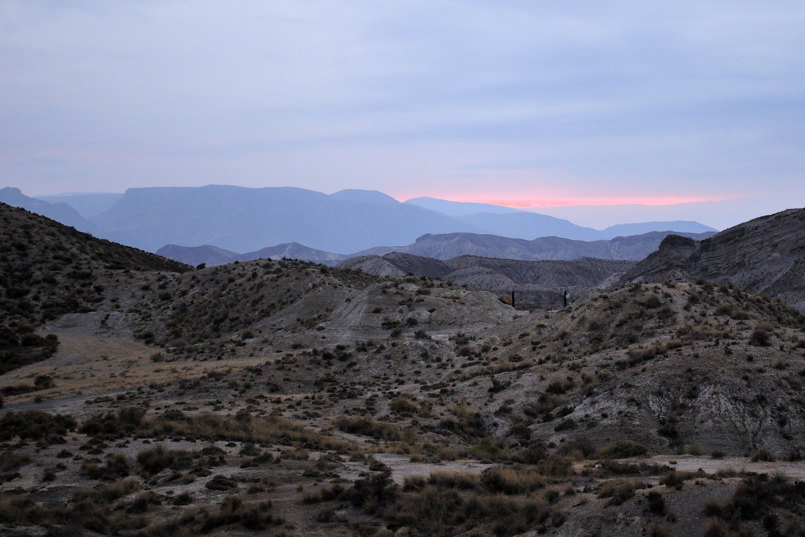 Desierto de Tabernas This is a photography of a Special Area of Conservation in Spain with the ID: ES0000047. Natura2000 entry, EEA entry